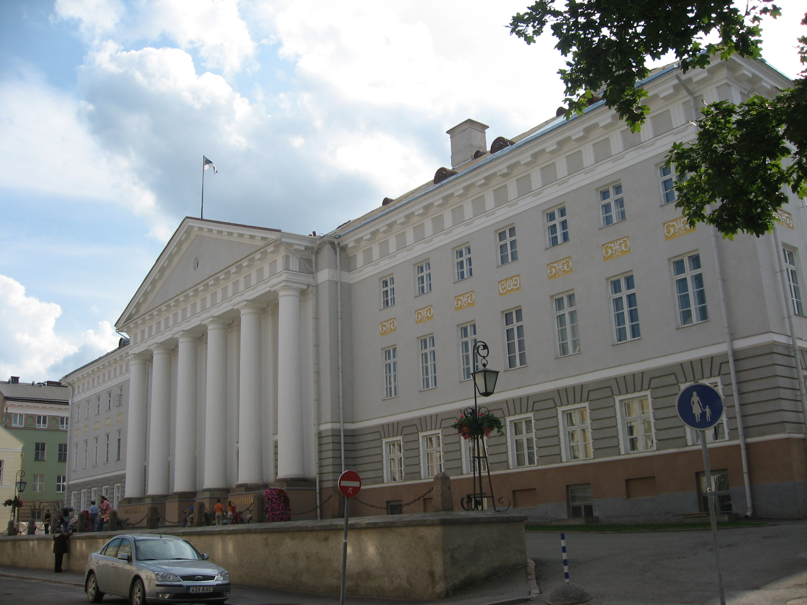 Univerzita Tartu, hlavní budova